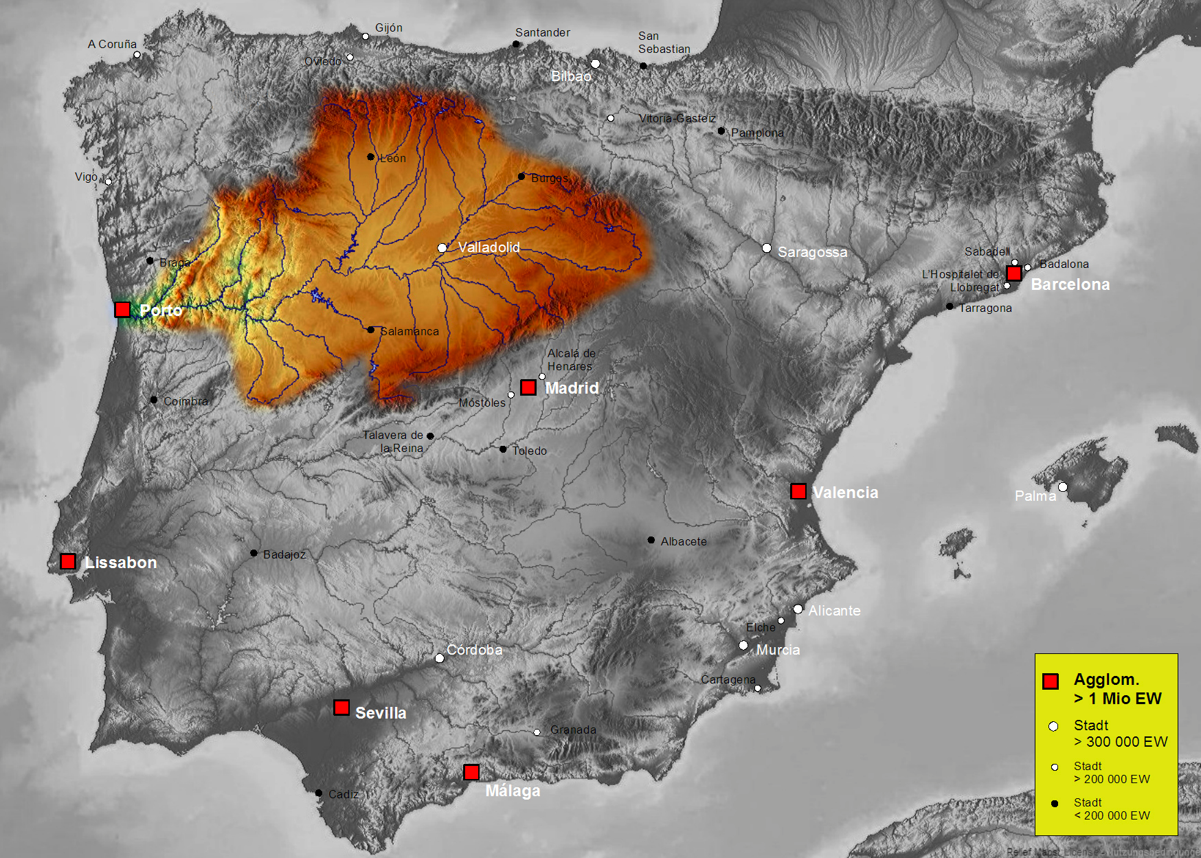 Map of Duero river basin in Spain, Karte des hydrogeografischen Beckens des Duero